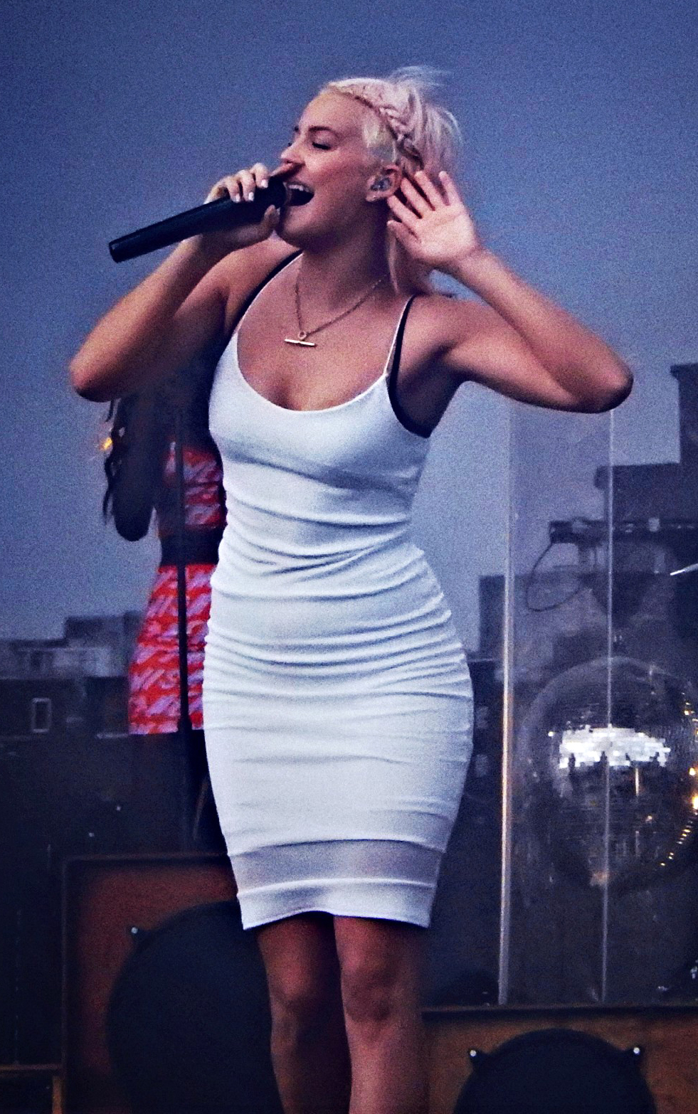 La cantante Anne-Marie en Rudimental, V Festival 2014, Chelmsford.